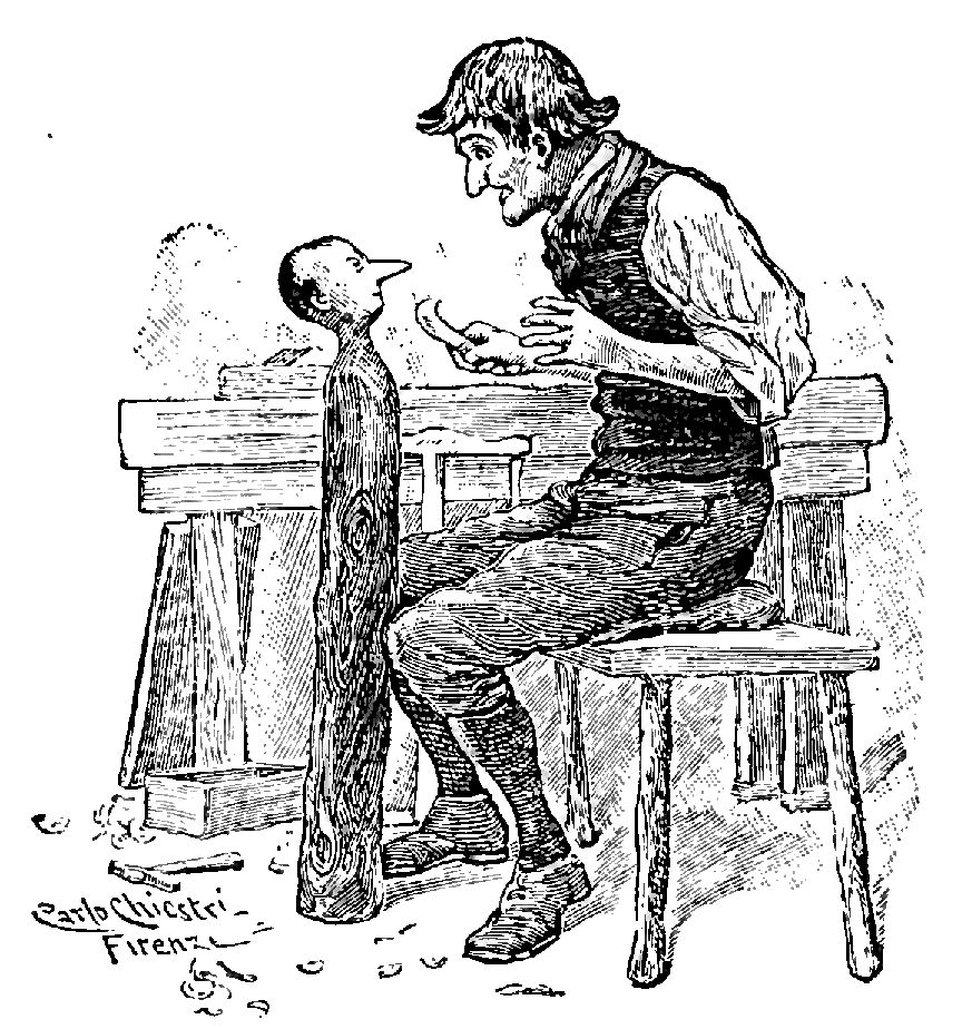 Illustrations from "Le avventure di Pinocchio, storia di un burattino", Carlo Collodi, Bemporad & figlio, Firenze 1902 (Drawings and engravings by Carlo Chiostri, and A. Bongini)